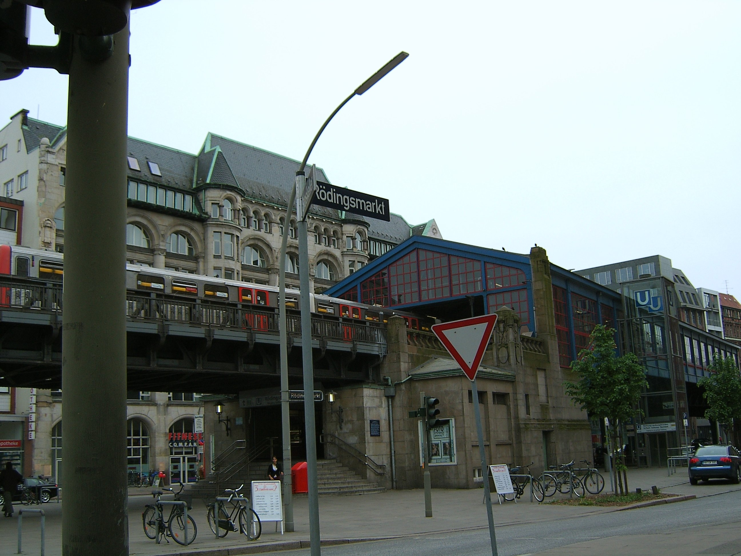 Die Hochbahnhaltestelle Rödingsmarkt in der Hamburger Neustadt wurde im Rahmen des Baus der Ringlinie von Raabe & Wöhlecke 1910 bis 1912 erbaut. Heute wird sie von der Linie U3 (Barmbek - Mümmelmannsberg) bedient.